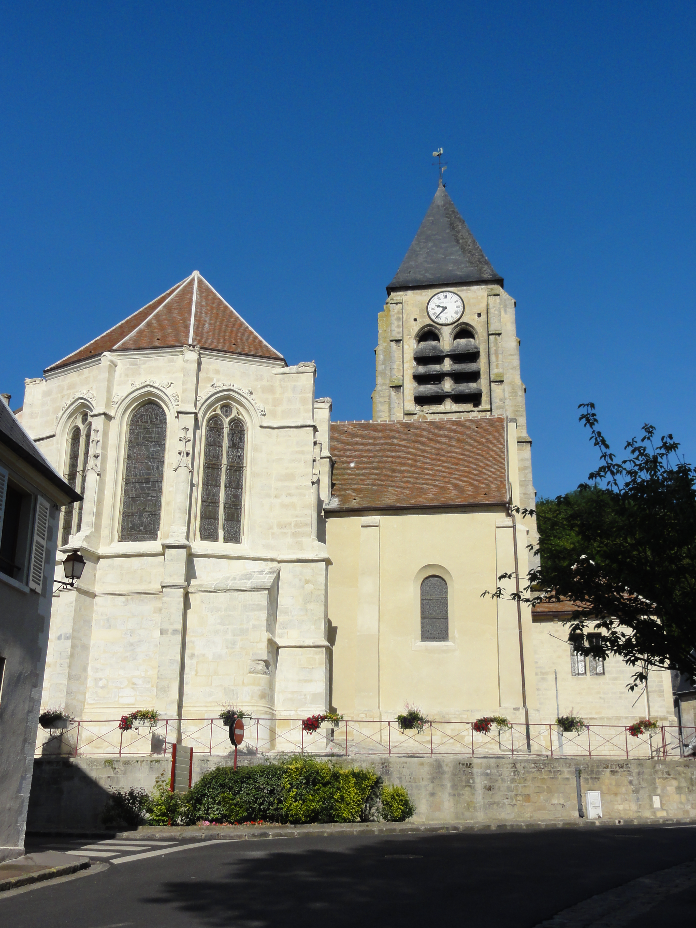 Église Saint-Germain-l'Auxerrois, chœur et façade est.